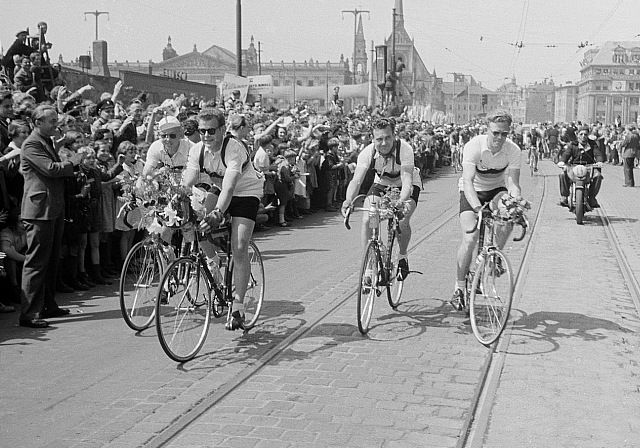 Original image description from the Deutsche FotothekPortrait des Radrennfahrerteams der DDR anläßlich der Friedensfahrt